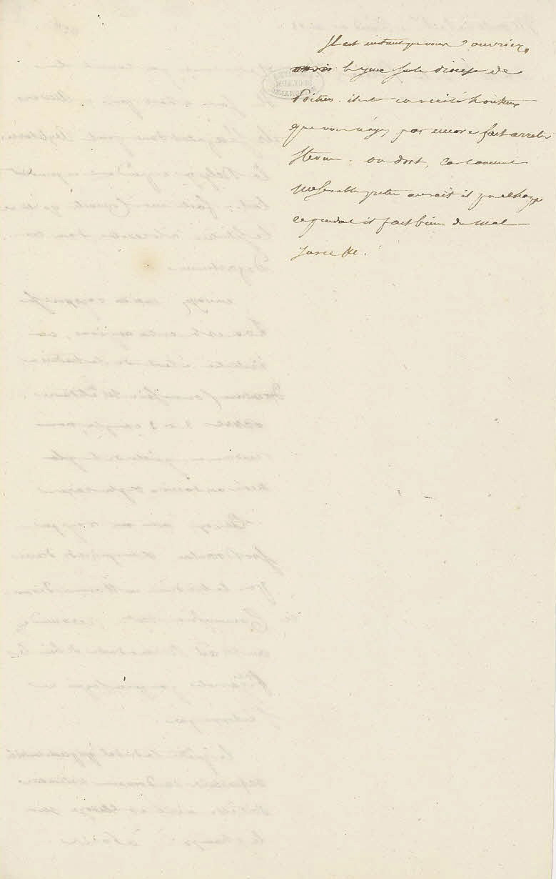 Minute d’une lettre de Napoléon Ier à Joseph Fouché, ministre de la Police générale (1799–1802, 1804–1810), lui enjoignant de rédiger un rapport contre l’espion André Làa et ses complices, Mantoue